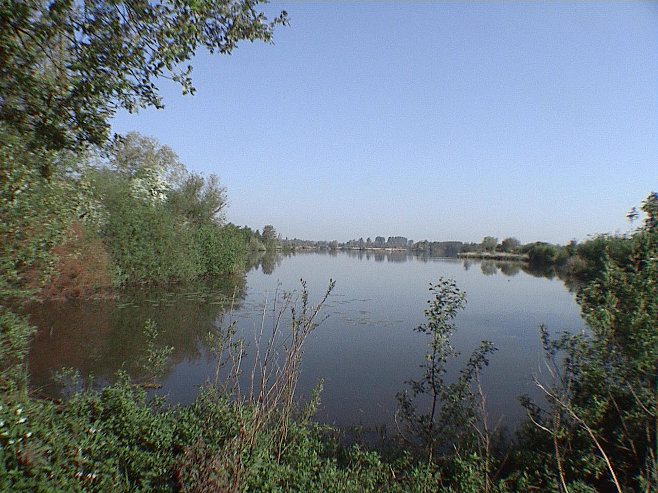 Réserve naturelle nationale des étangs du Romelaëre à Clairmarais